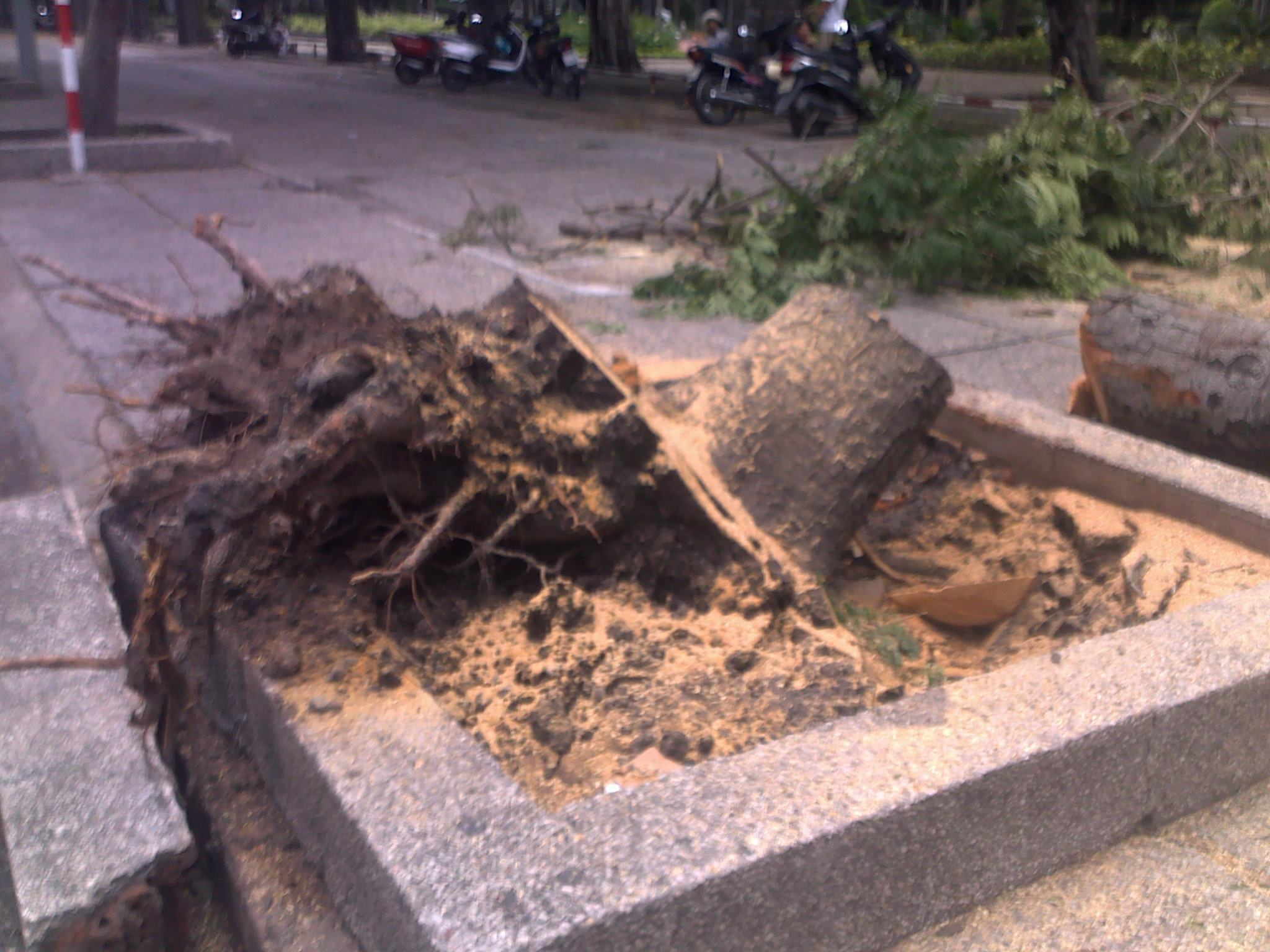 Cây trước công viên Tao Đàn, đường Nguyễn Thị Minh Khai, Quận 1, Thành phố Hồ Chí Minh sau cơn bão Pakhar.